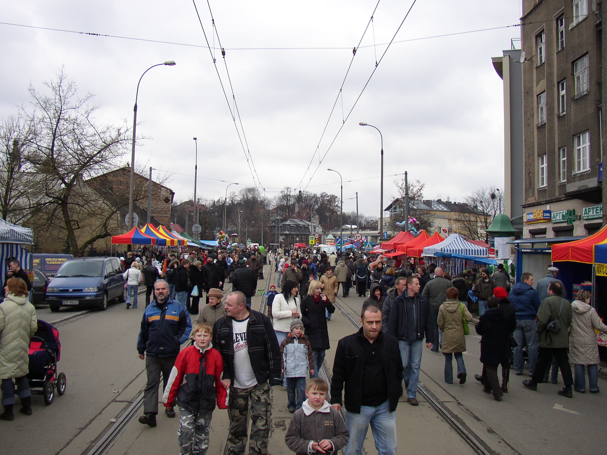 Kraków - Emaus 2008 - festival - ulica Tadeusza Kościuszki